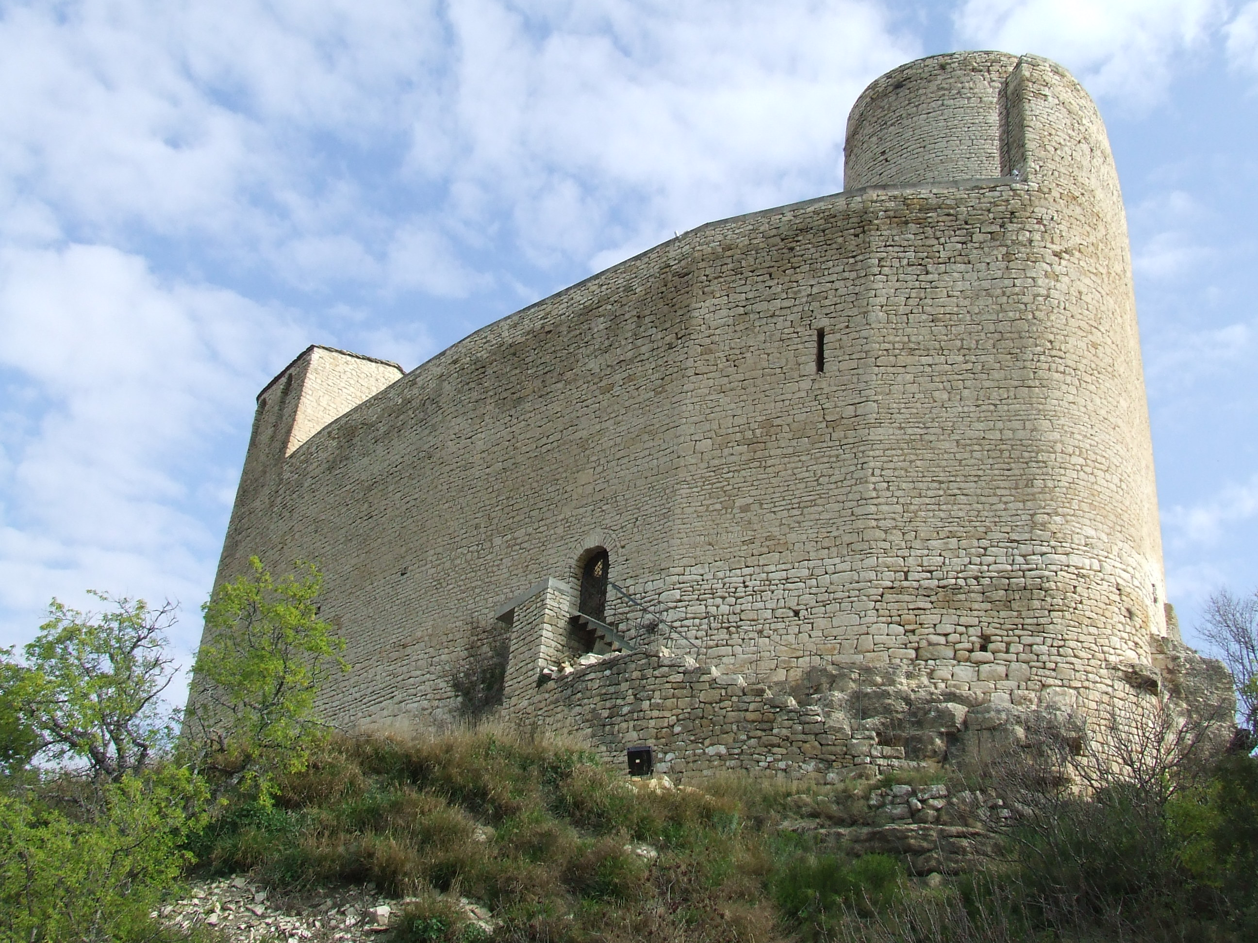 Façana de migdia del castell de Mur (Castell de Mur, Pallars Jussà)